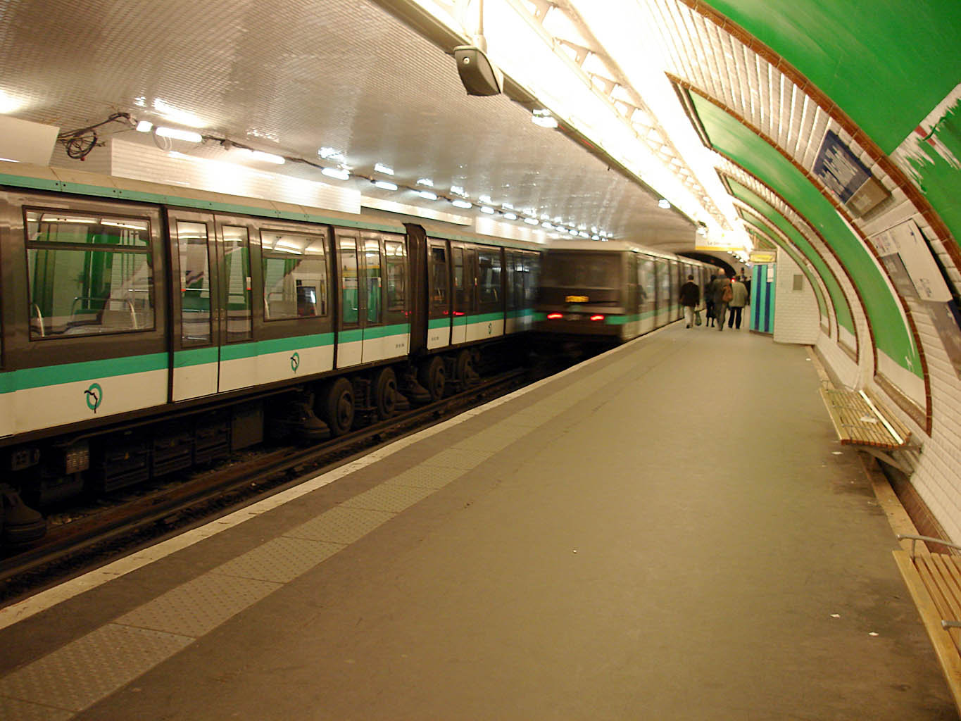 Station Porte Maillot de la ligne 1 du métro de Paris, France.